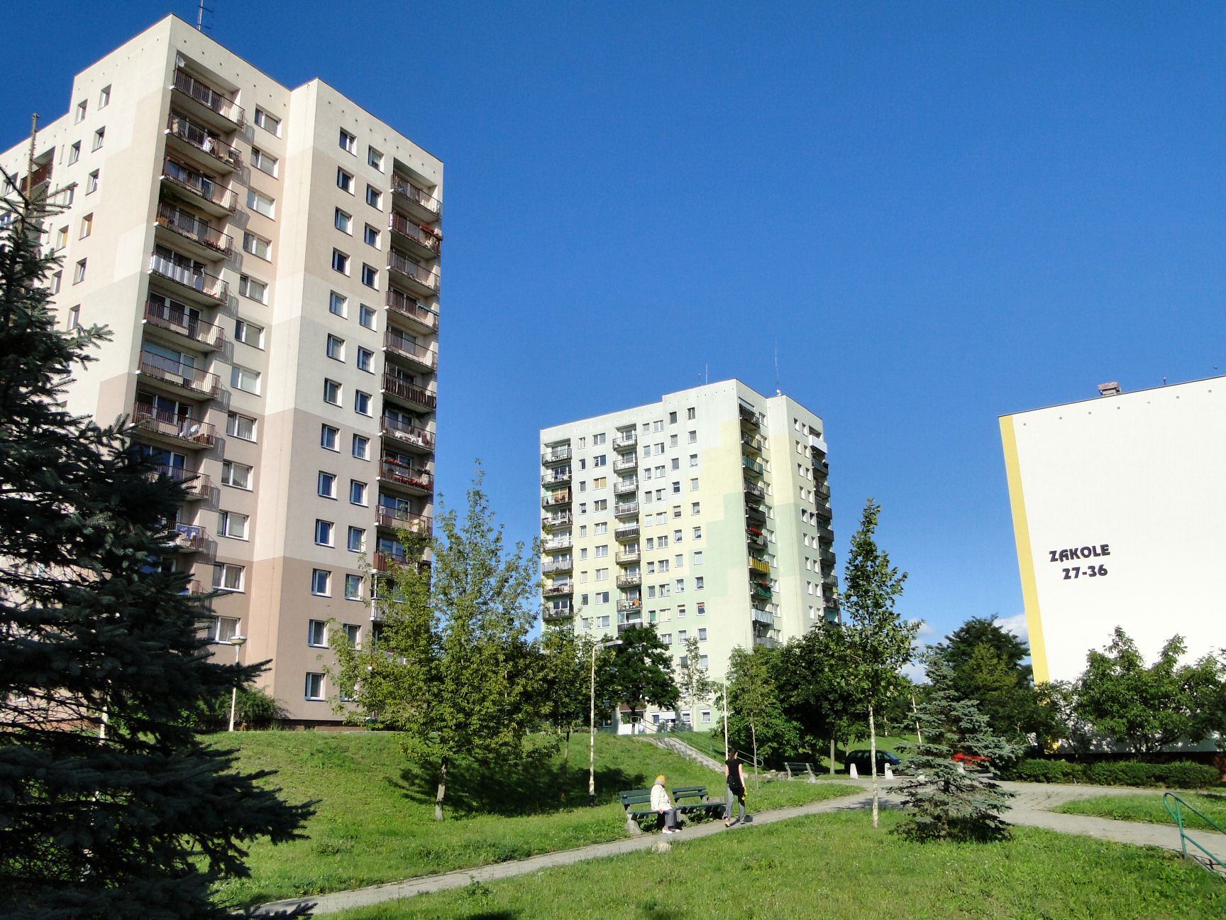 Osiedle Arkońskie w Szczecinie